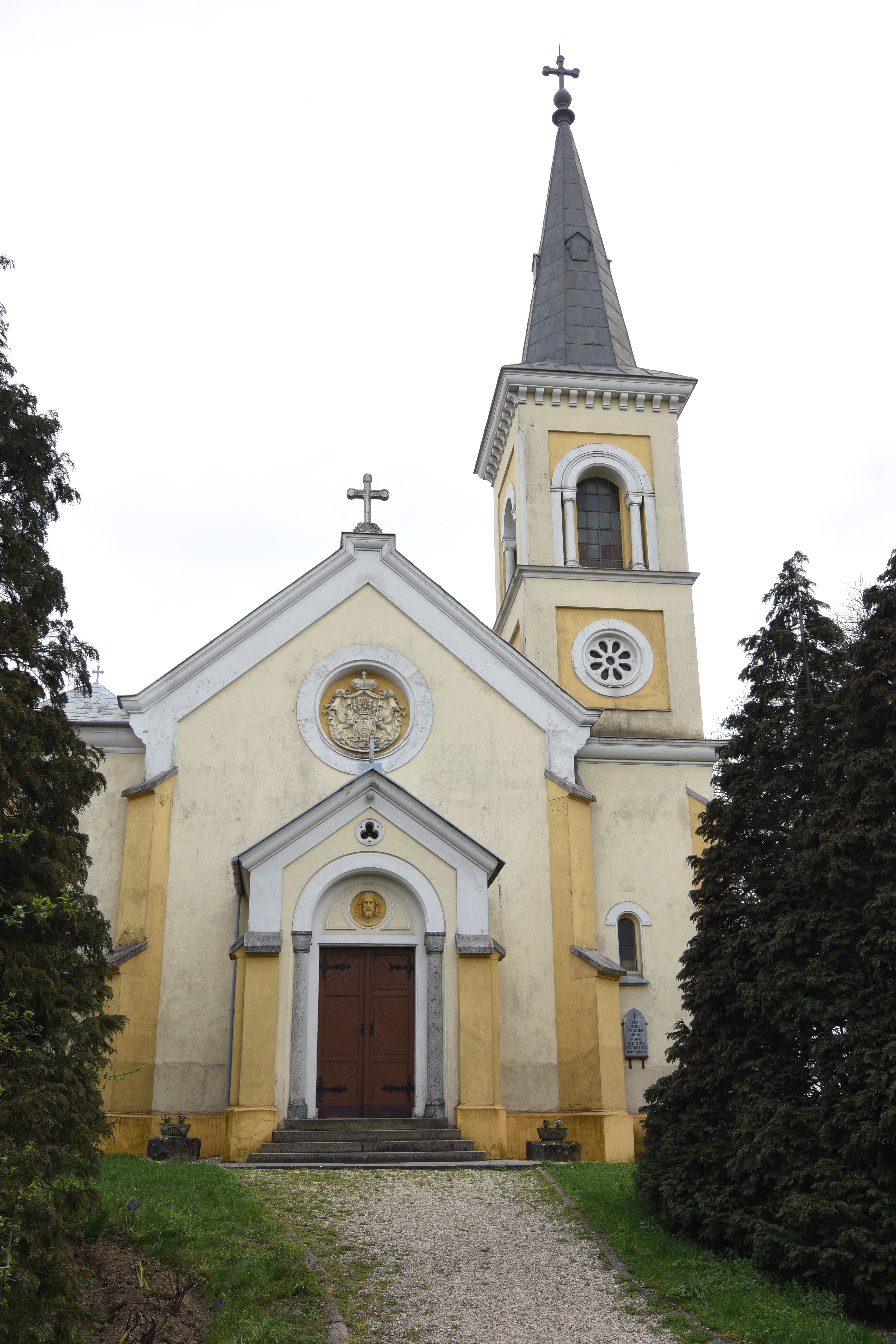 Roman Catholic Church in Nádasd